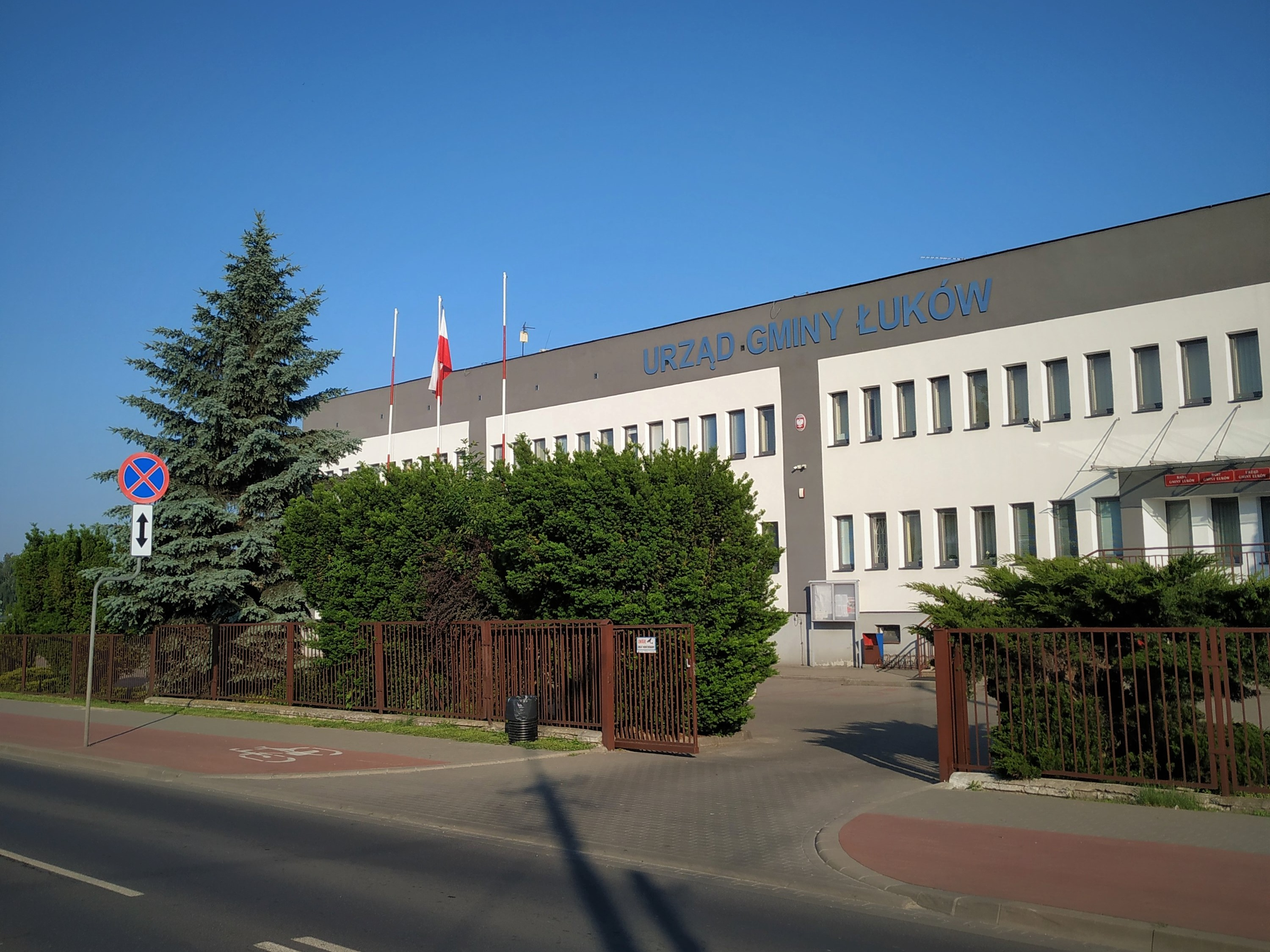 Urząd gminy Łuków